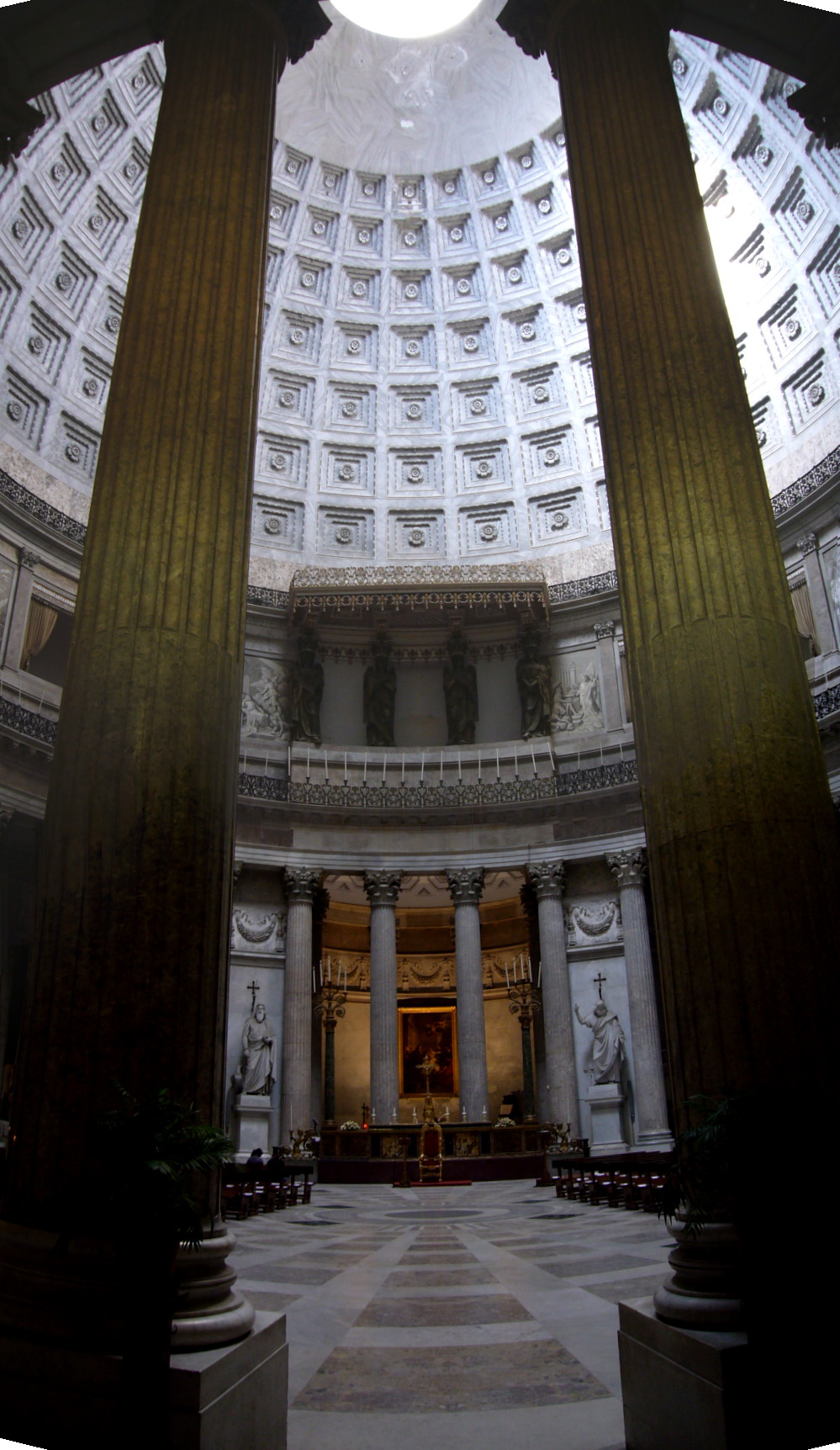 Napoli, San Francesco di Paola: prospettiva